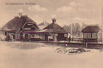 Gamla bilder från Norrvikens Villastad